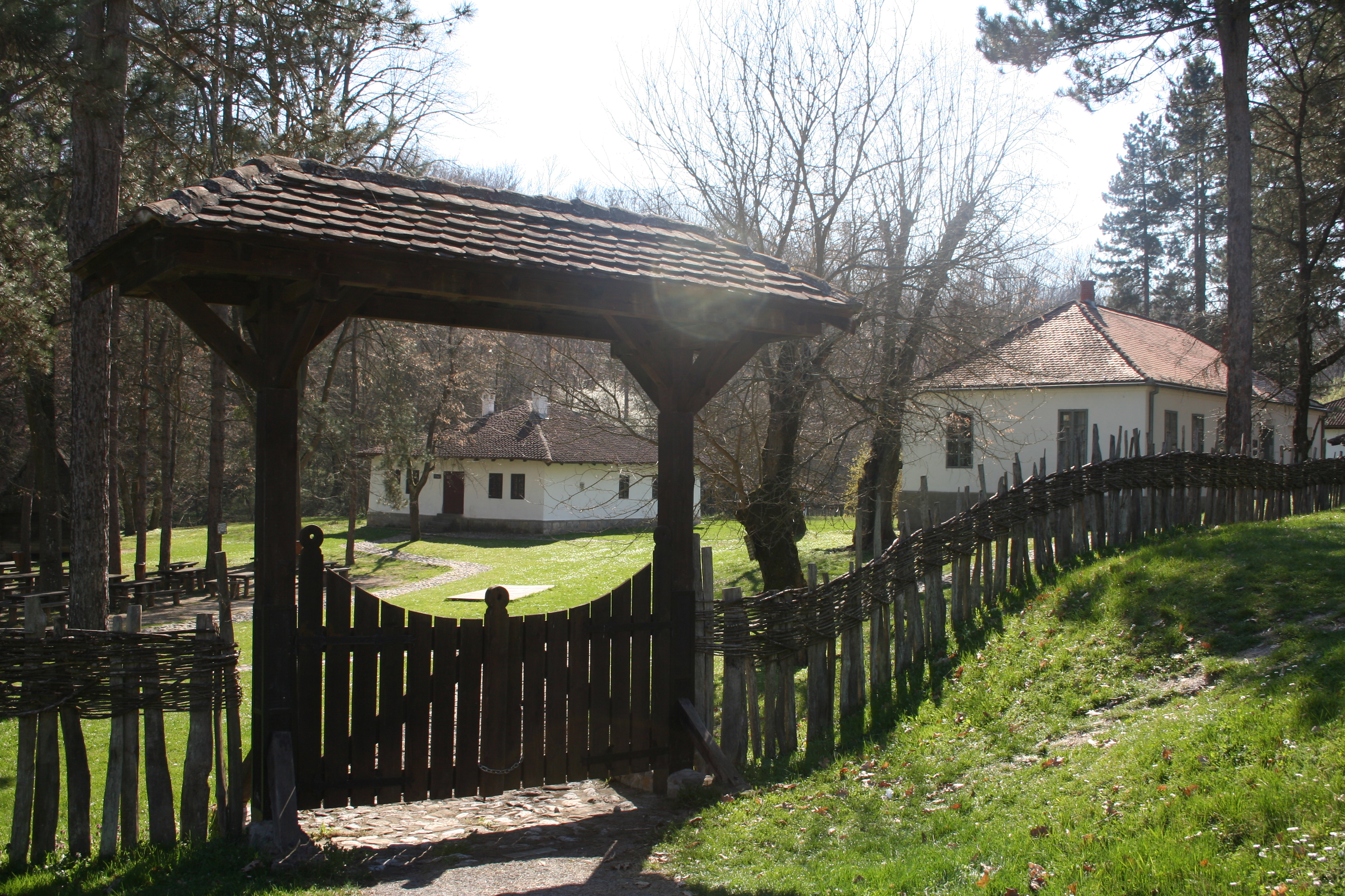 Ulaz u školsko dvorište, Brankovina